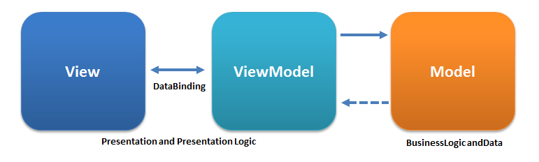 Model-View-ViewModelパターン概念図